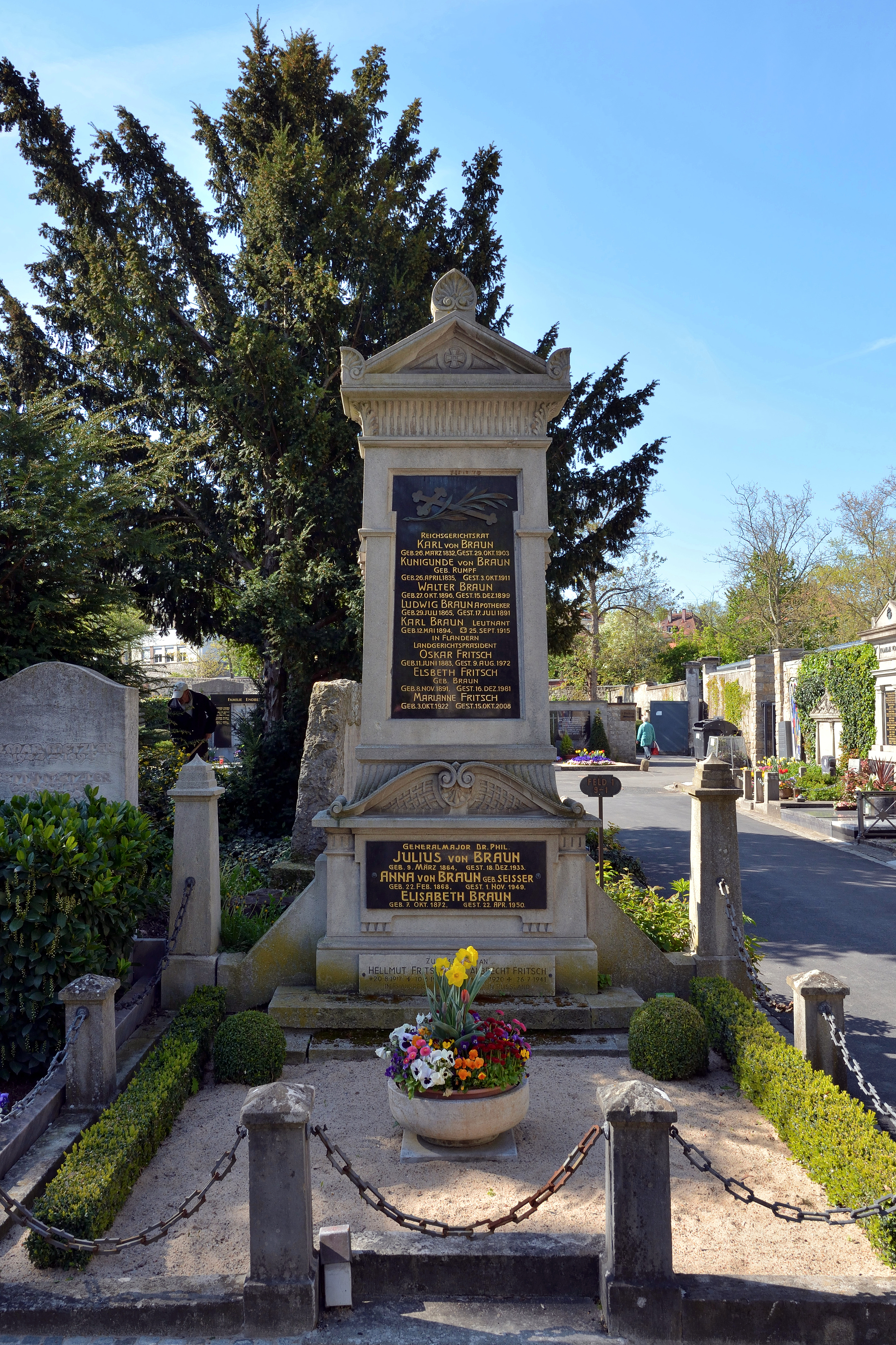 Impressionen vom Hauptfriedhof Würzburg Grabmal von Karl von Braun Grabmal von Julius von Braun (Generalmajor)